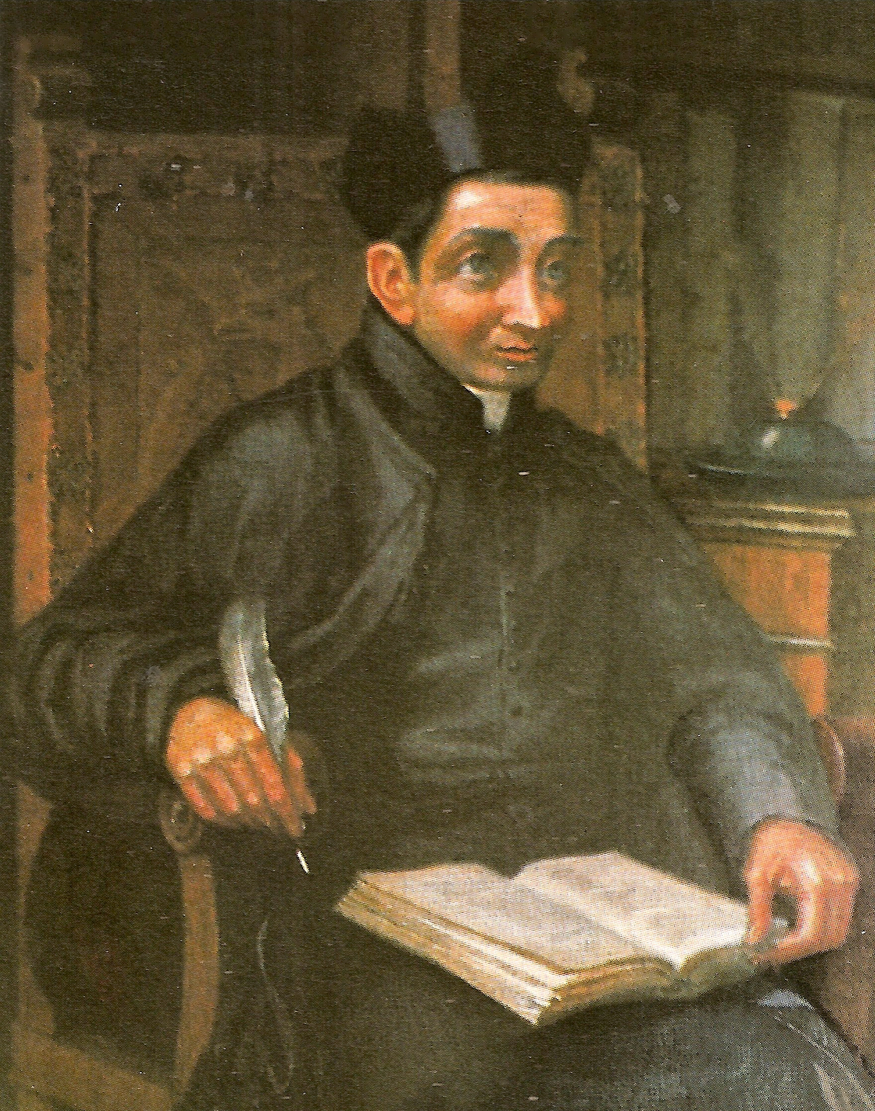 Juan de Castellanos. S/F. Óleo/Tela. Academia Colombiana de Historia, Bogota - Colombia.